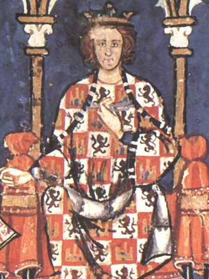 Alfonso X el Sabio. (Scanned from Four Gothic Kings, Elizabeth Hallam ed)